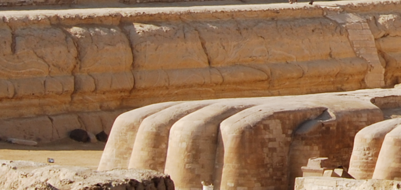 Gizako Esfinge Handiaren Ur Higaduraren Hipotesiak egitura inguratzen duen harresian ur-arrastoak aurki daitezkeela dio eta irudiaren goialdean ageri dira.